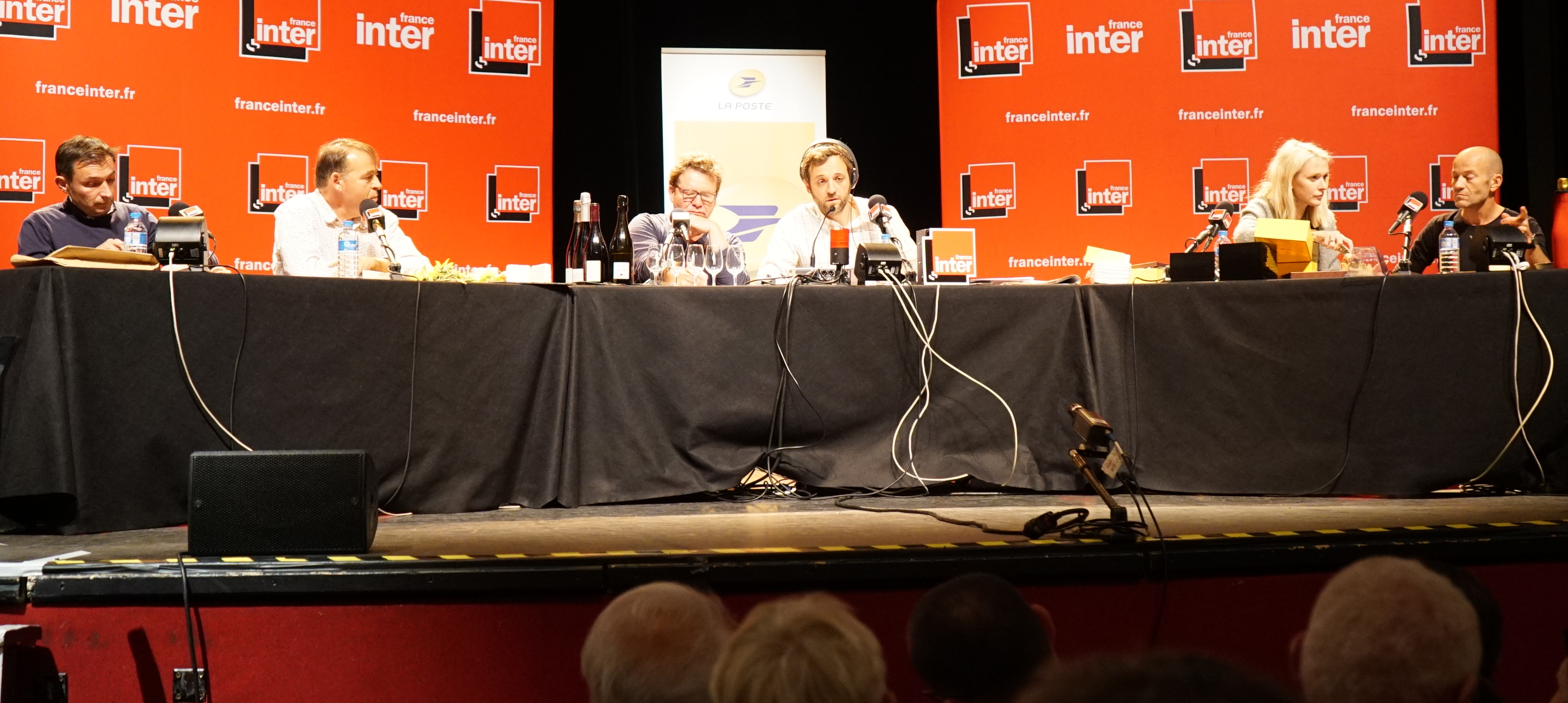 l'émission dans le théâtre de Troyes.